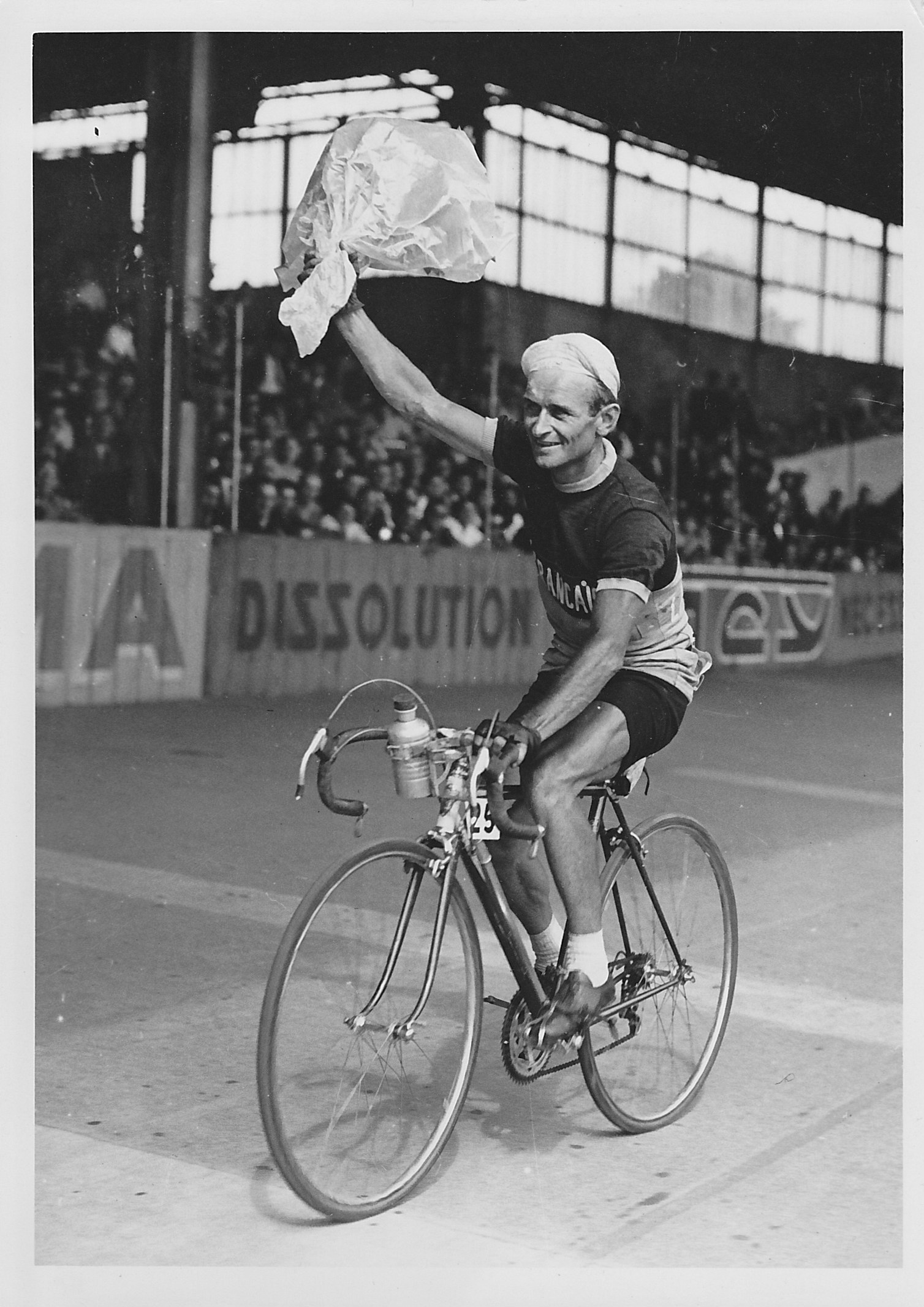 Vainqueur des Boucles de la Seine 1952